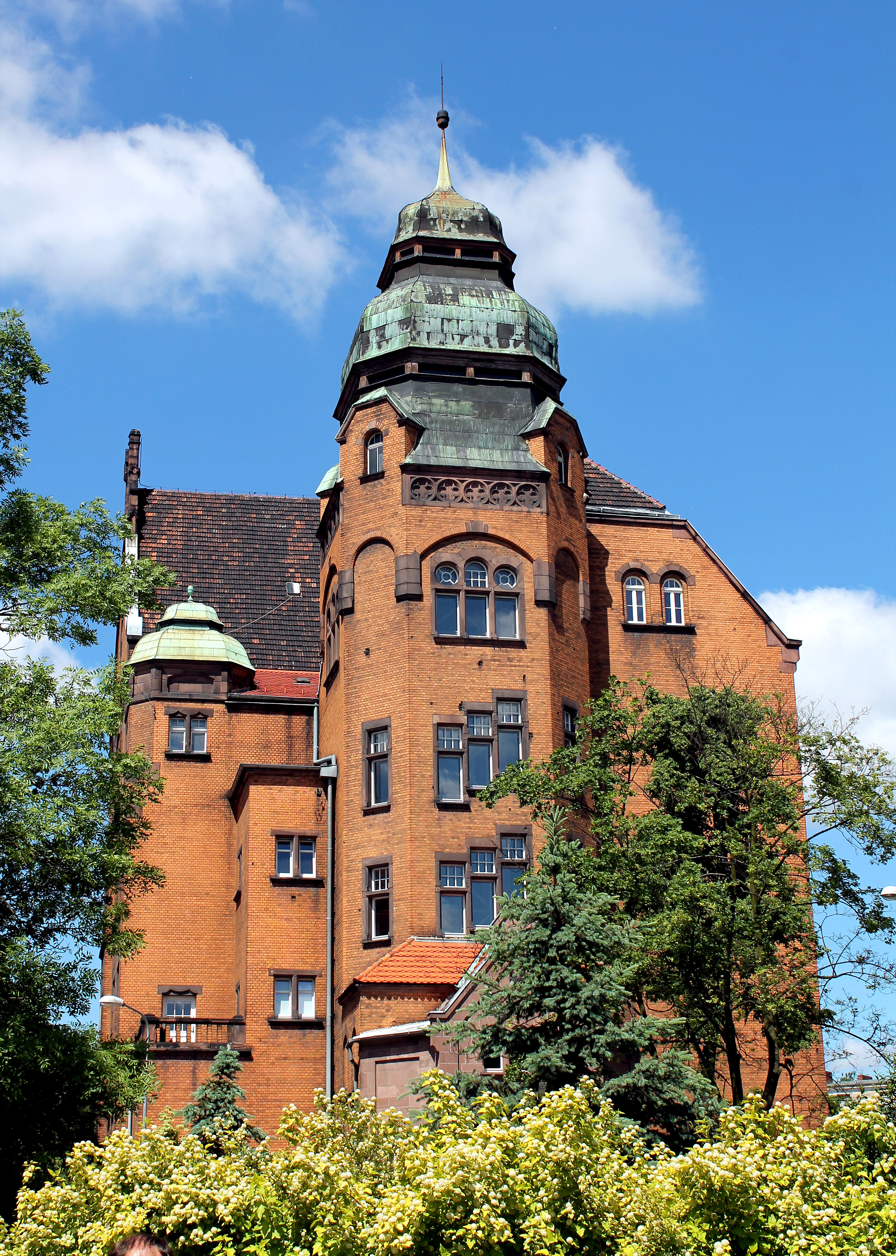 Rektorat Politechniki Poznańskiej na Wildzie